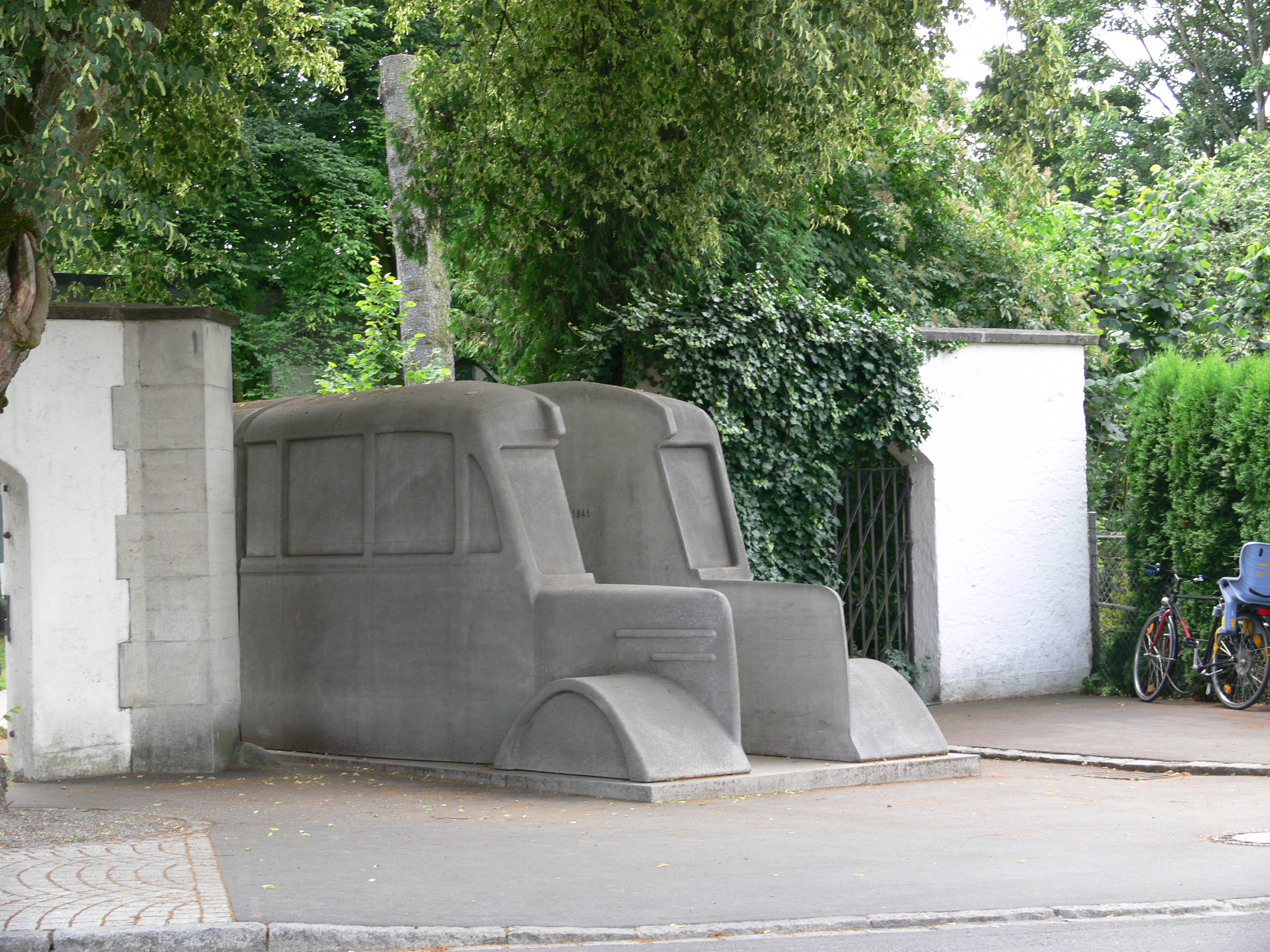 Weißenau (Ortsteil von Ravensburg): Das Denkmal der grauen Busse (Entwurf: Horst Hoheisel und Andreas Knitz)